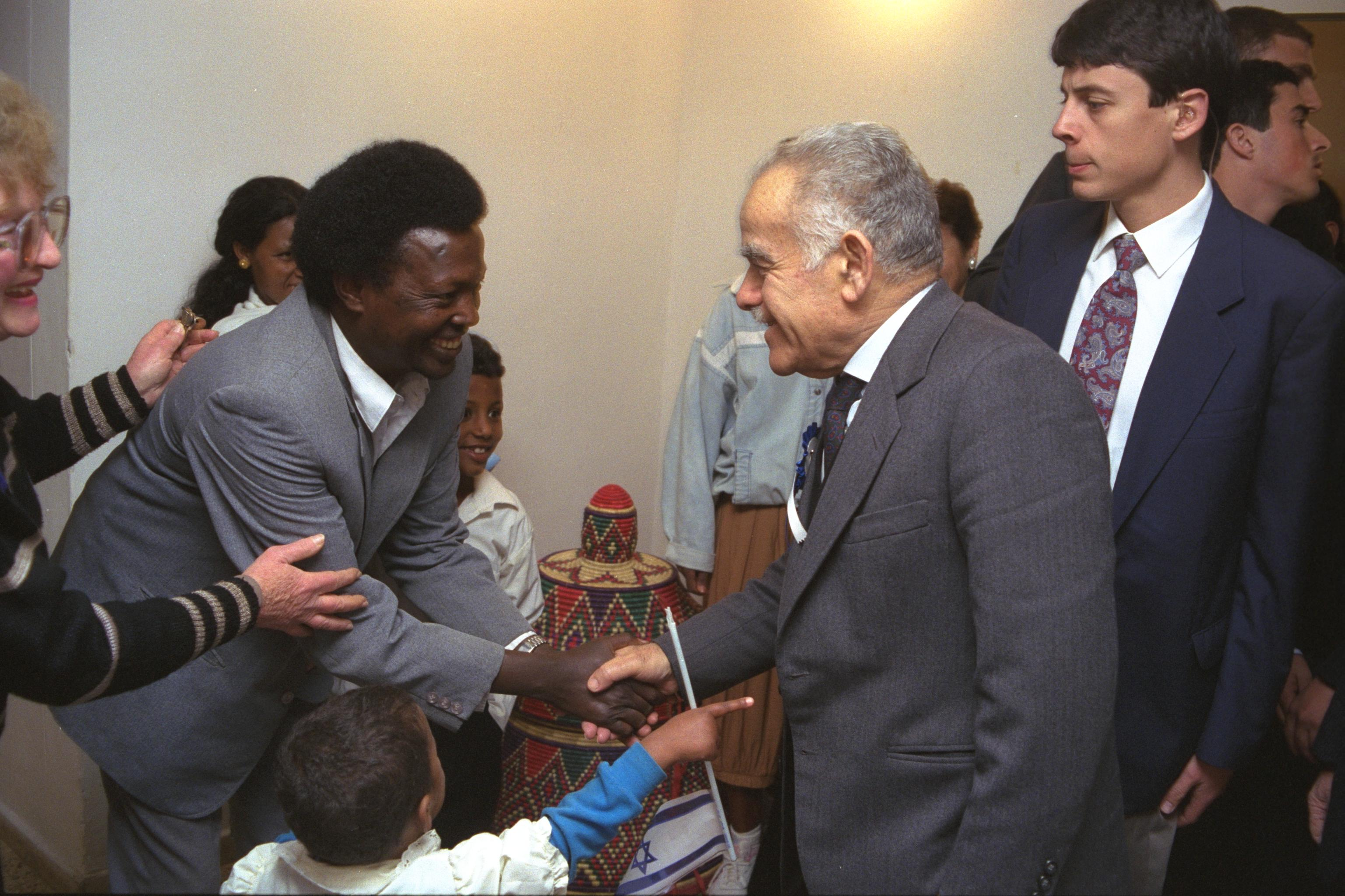 PM YITZHAK SHAMIR (C) GREETS NEW IMMIGRANTS FROM ETHIOPIA AT A HADERA ABSORPTION CENTER, OPERATION SOLOMON. ראש הממשלה, יצחק שמיר, מברך עולים חדשים מאתיופיה עם הגעתם למרכז הקליטה בחדרה